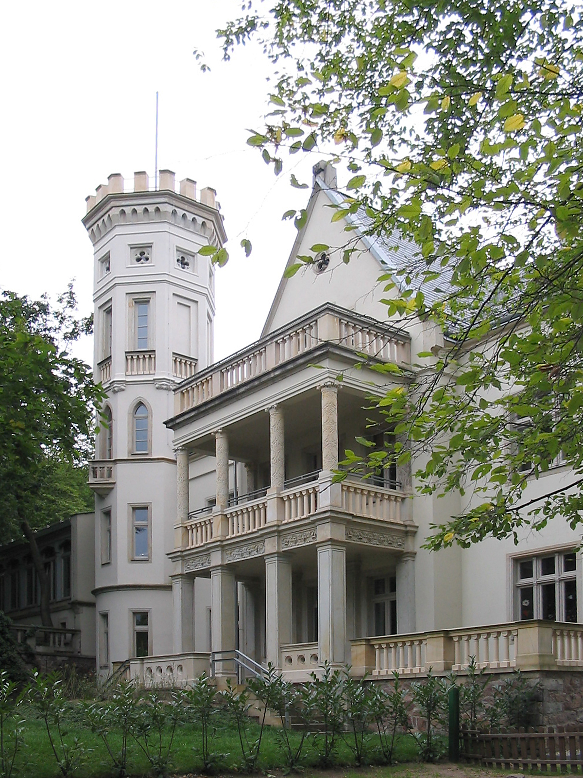 Radebeul, Mohrenhaus, Gartenseite